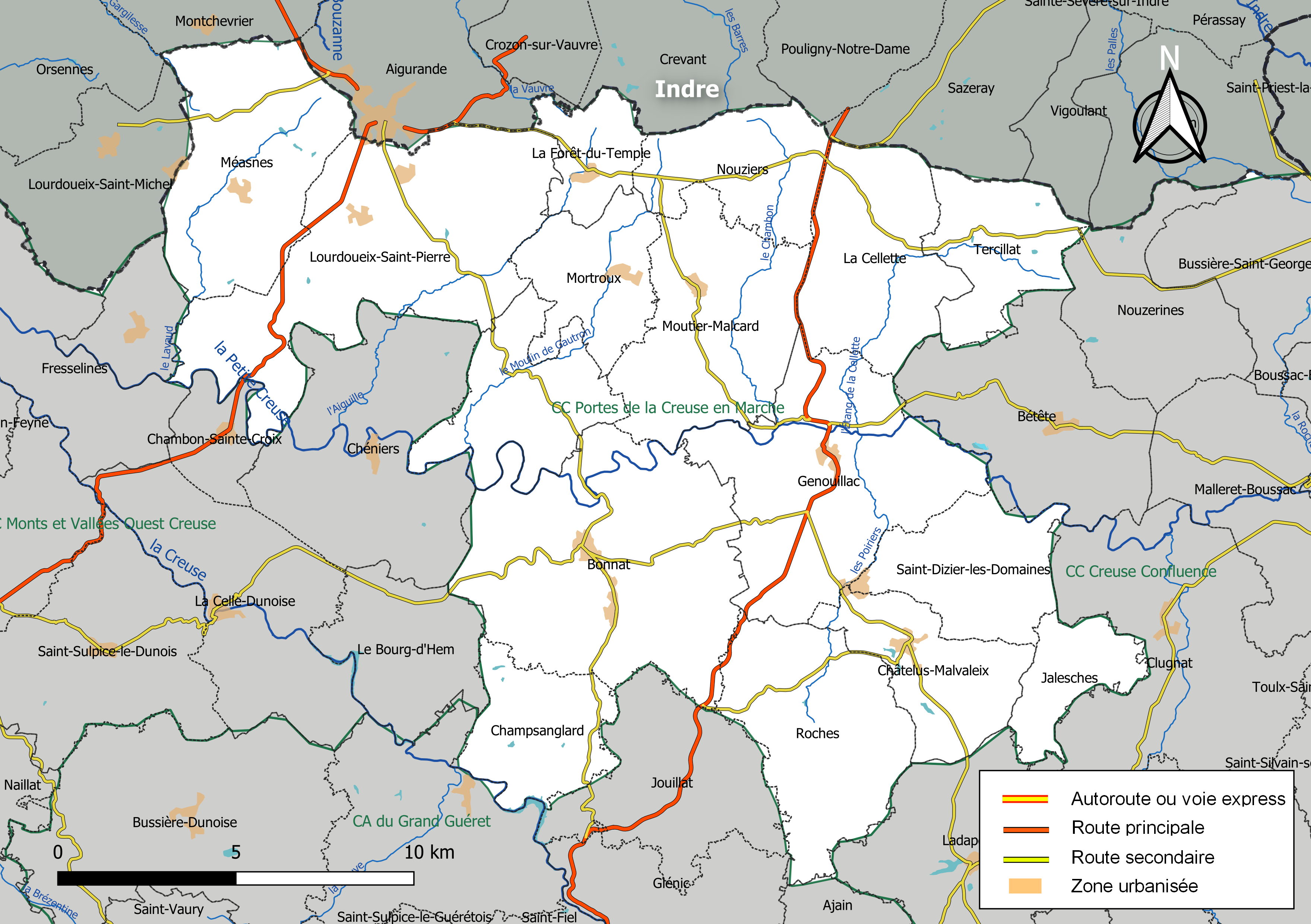 Carte géographique de la Communauté de communes Portes de la Creuse en Marche, département de la Creuse, France. Composition au 1er janvier 2019.